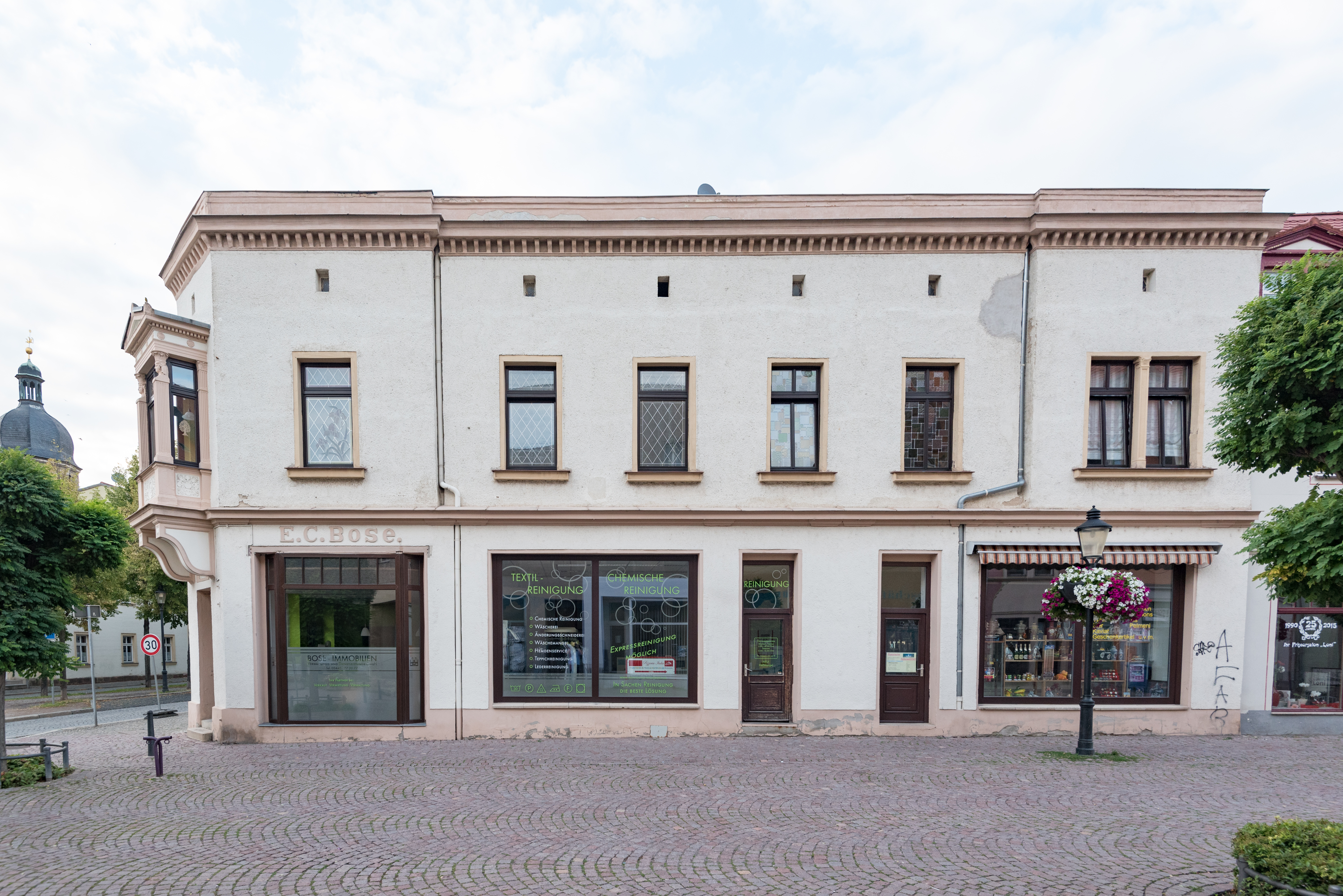 Naumburg (Saale), Lindenring 1